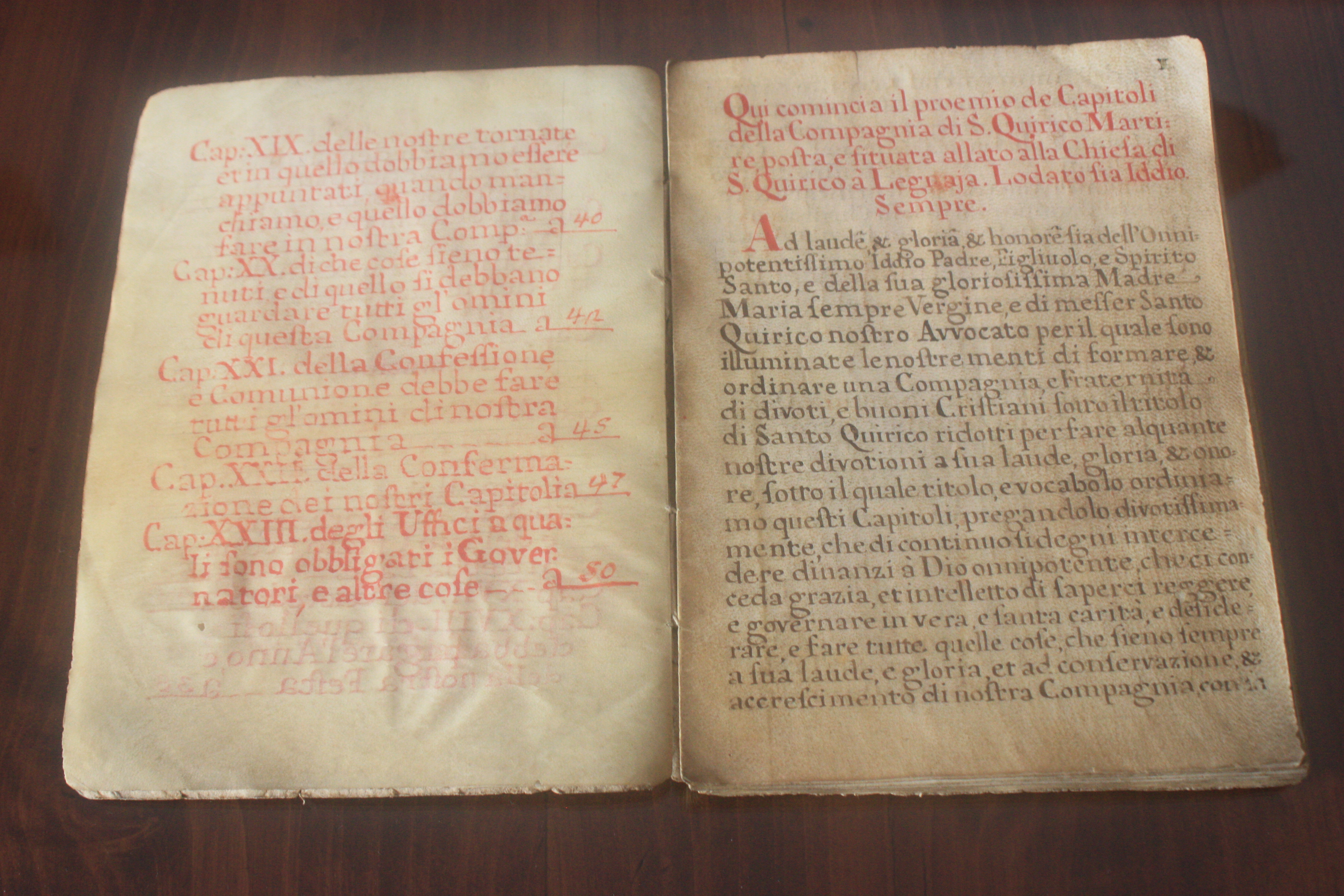 Prime due pagine del libro della Compagnia di San Quirico, risalente al Quattrocento